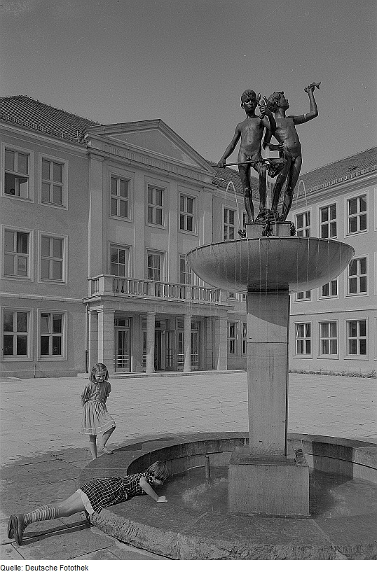 Original image description from the Deutsche FotothekDresden. Schulhofbrunnen